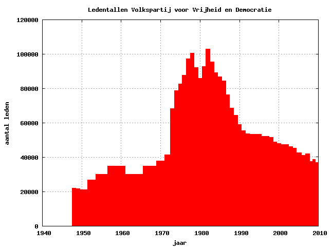 Verdere uitwerking van oudere grafiek, die tot 2003 ging.